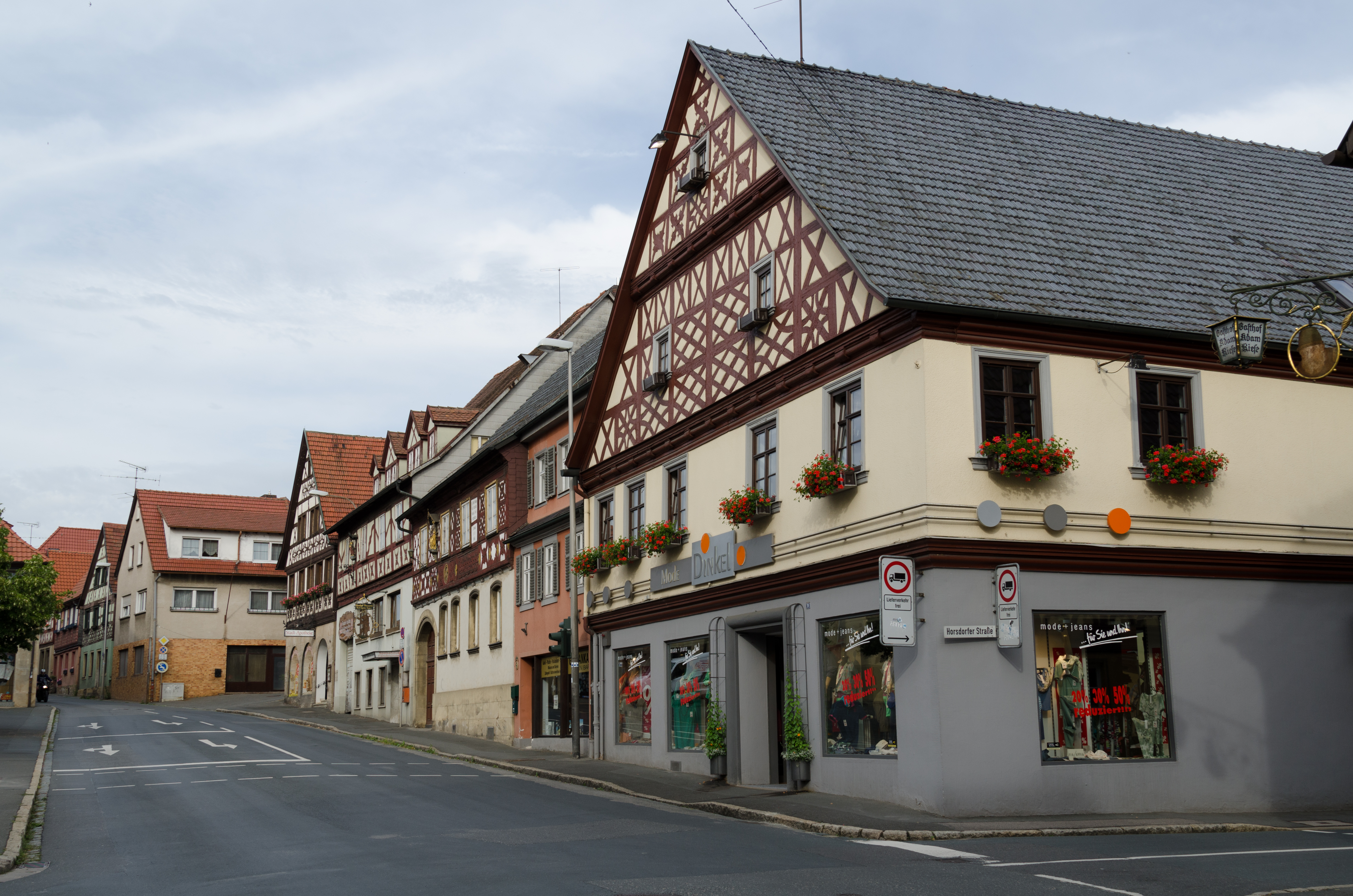 Bad Staffelstein, Marktplatz 6-10